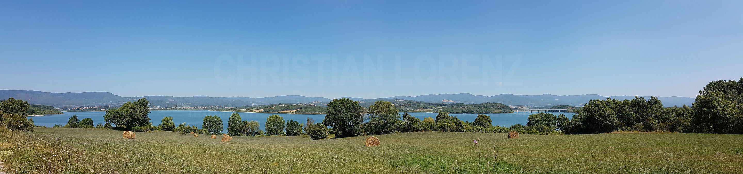 Panoramica del Lago di Bilancino, Barberino di Mugello.